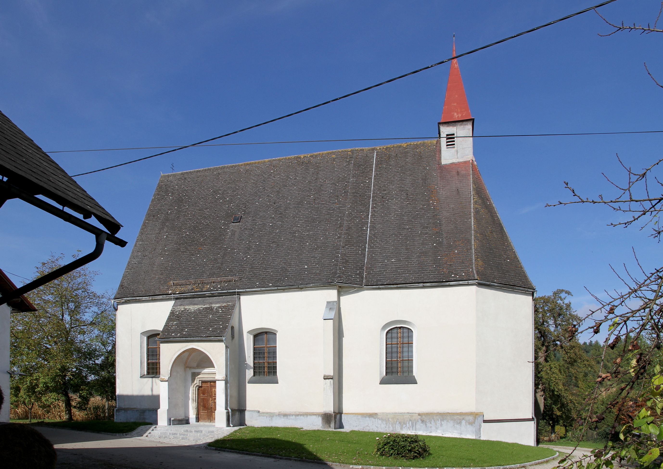 Die katholische Filialkirche Hl. Kreuz in Hainbach, ein Ortsteil der oberösterreichischen Gemeinde Niederthalheim. Ein kleiner spätgotischer einschiffiger Bau mit einem barocken Chor aus dem Jahr 1684.